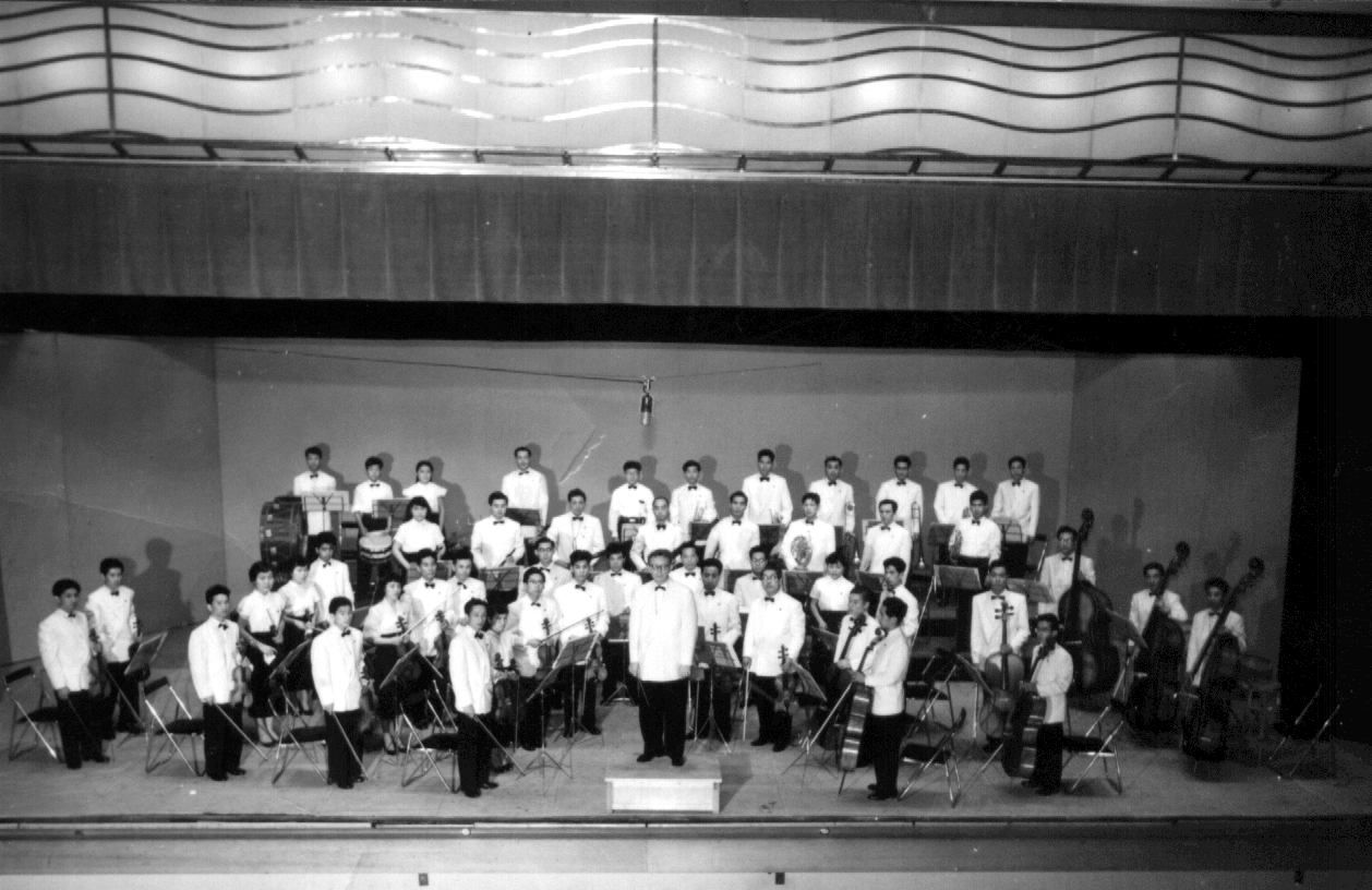 Carl Caelius leitete von 1955 bis 1966 in der Kaiserstadt Kyoto die Dirigentenklasse, das Hochschulorchester und den Chor.